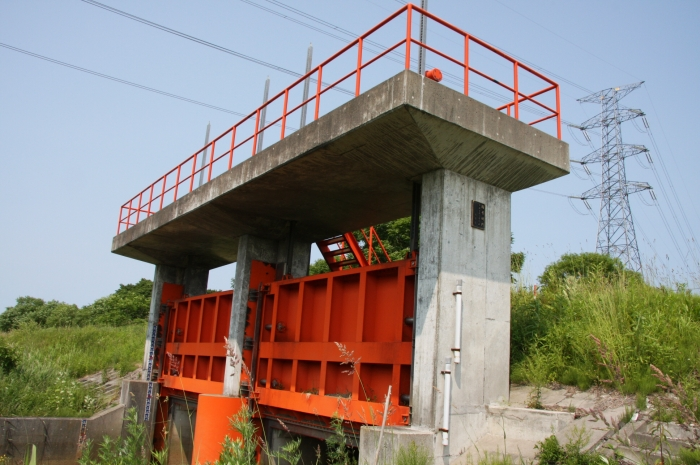 動力ラック方式で二連の四号樋門